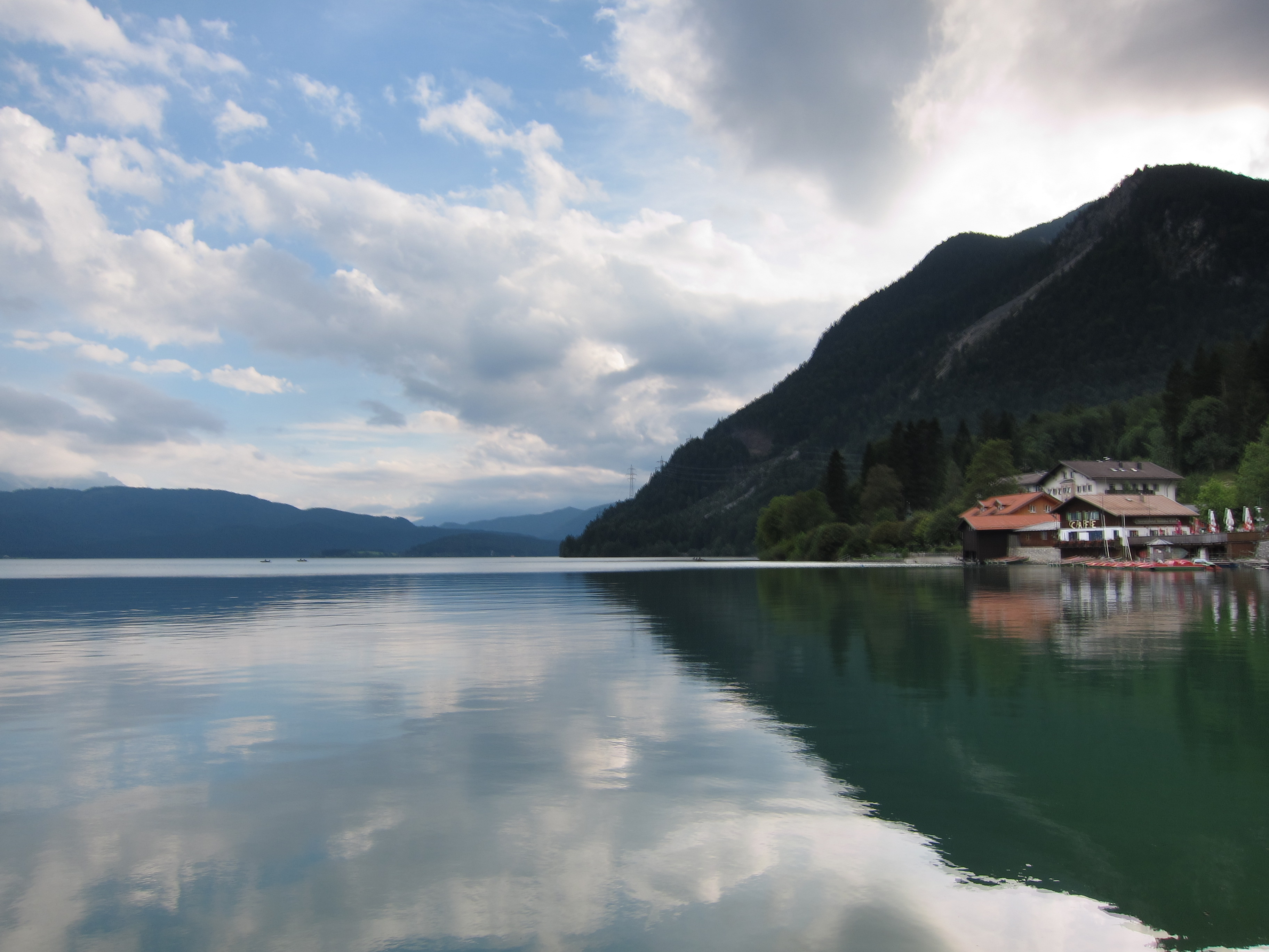 Spätnachmittags am Walchensee.